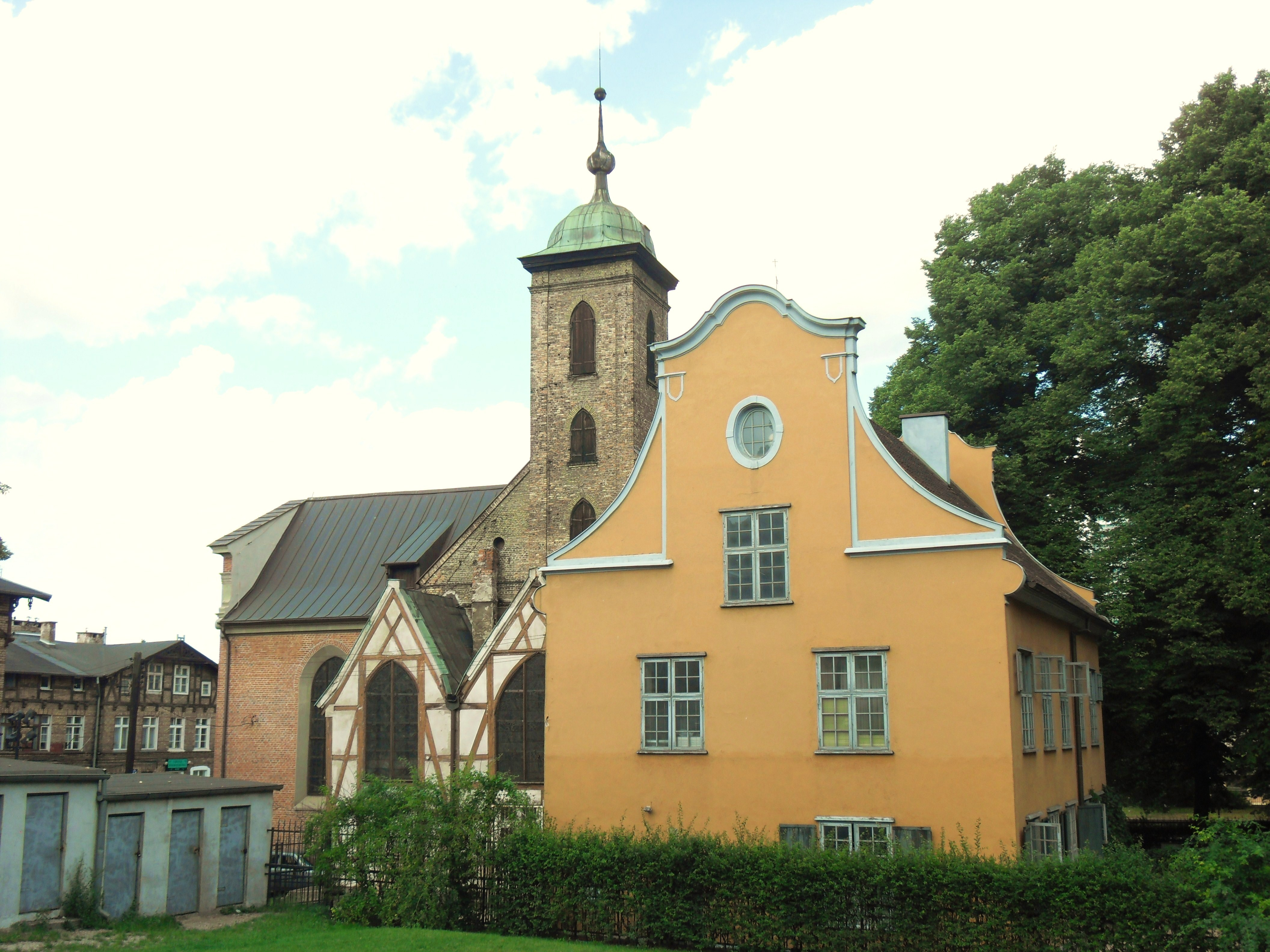 Kościół pw. Bożego Ciała w Gdańsku i plebania.